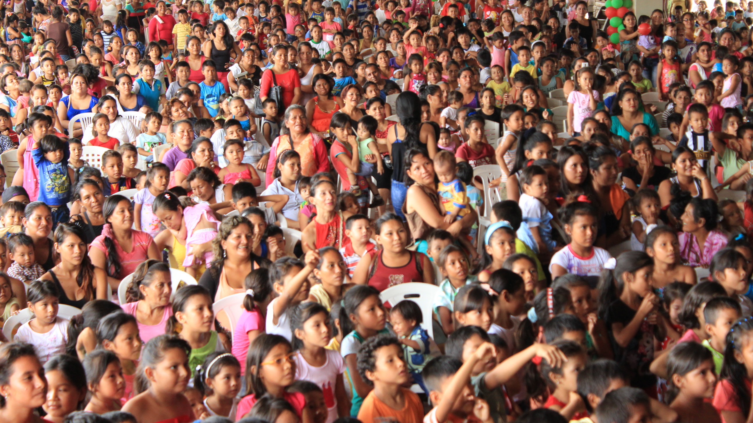 Gran grupo de personas en un evento social en Iquitos